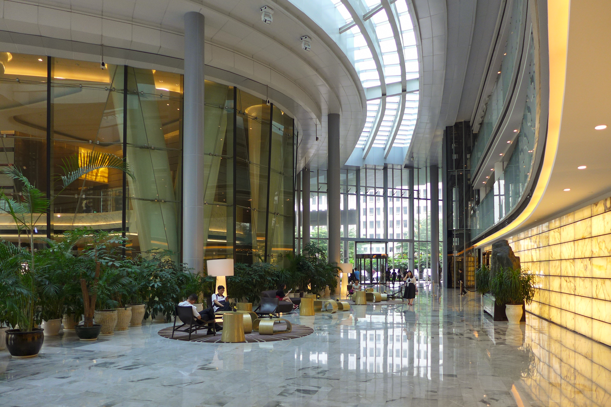 Guangzhou IFC Lobby